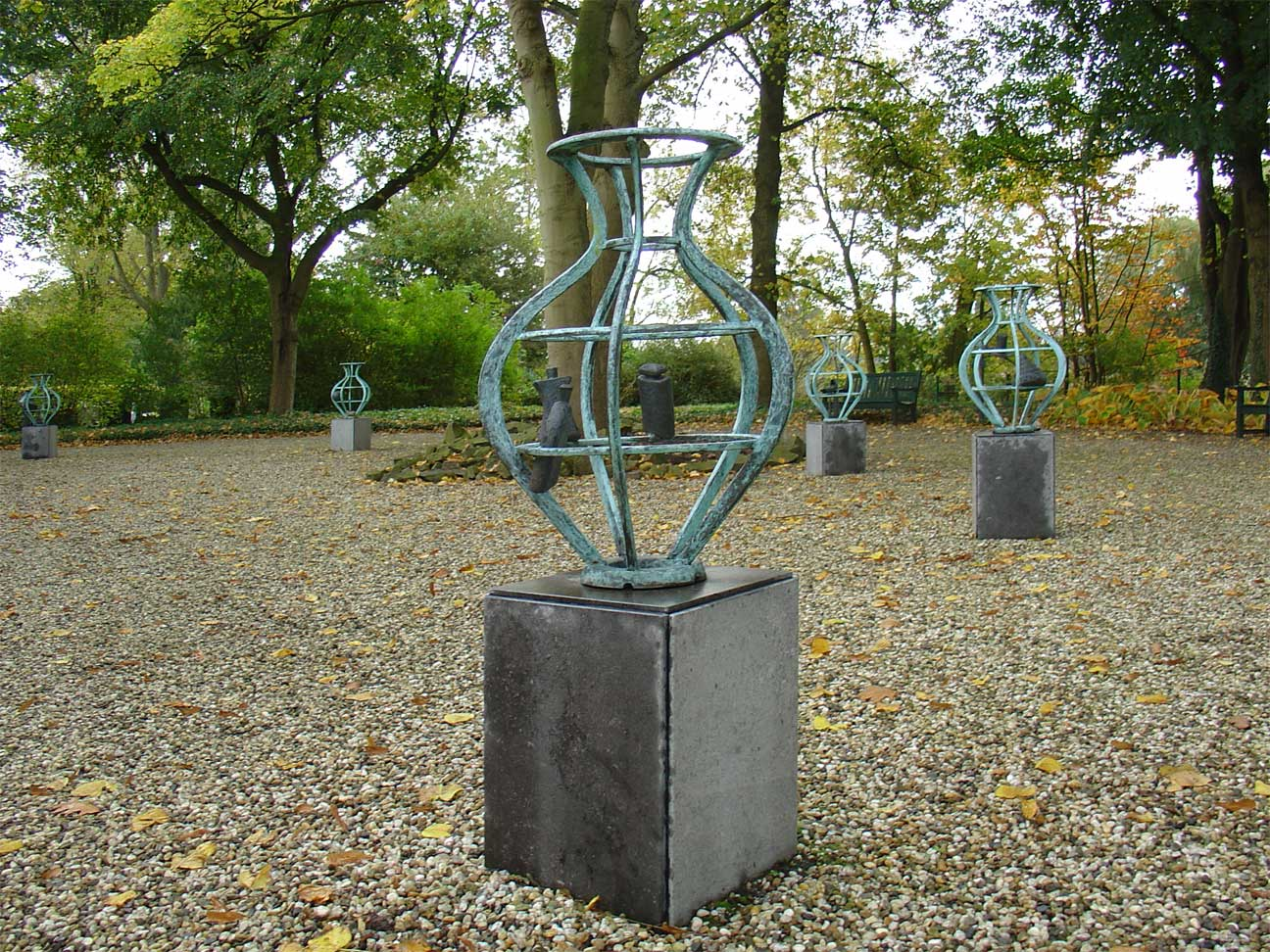 Familie van veertien bronzen beeldjes (2000) door Karola Pezarro (fragment) - Begraafplaats IJsselhof, Goejanverwelledijk Gouda. In februari 2015, zijn een aantal van deze beelden ontvreemd.